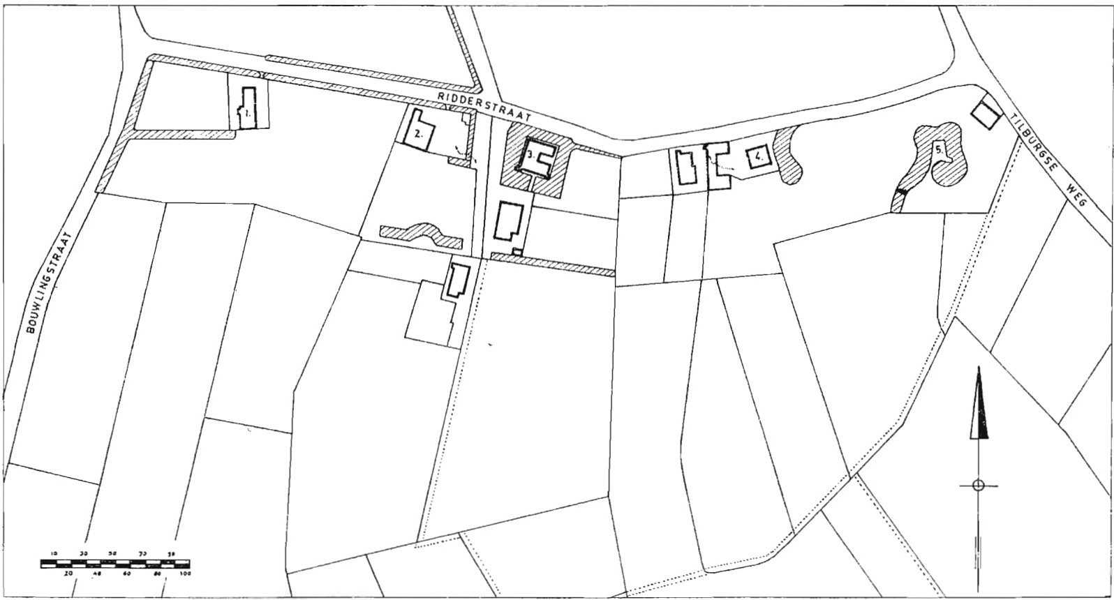 Slotjes van Oosterhout op kaart van omstreeks 1830, Oosterhout, Nederland